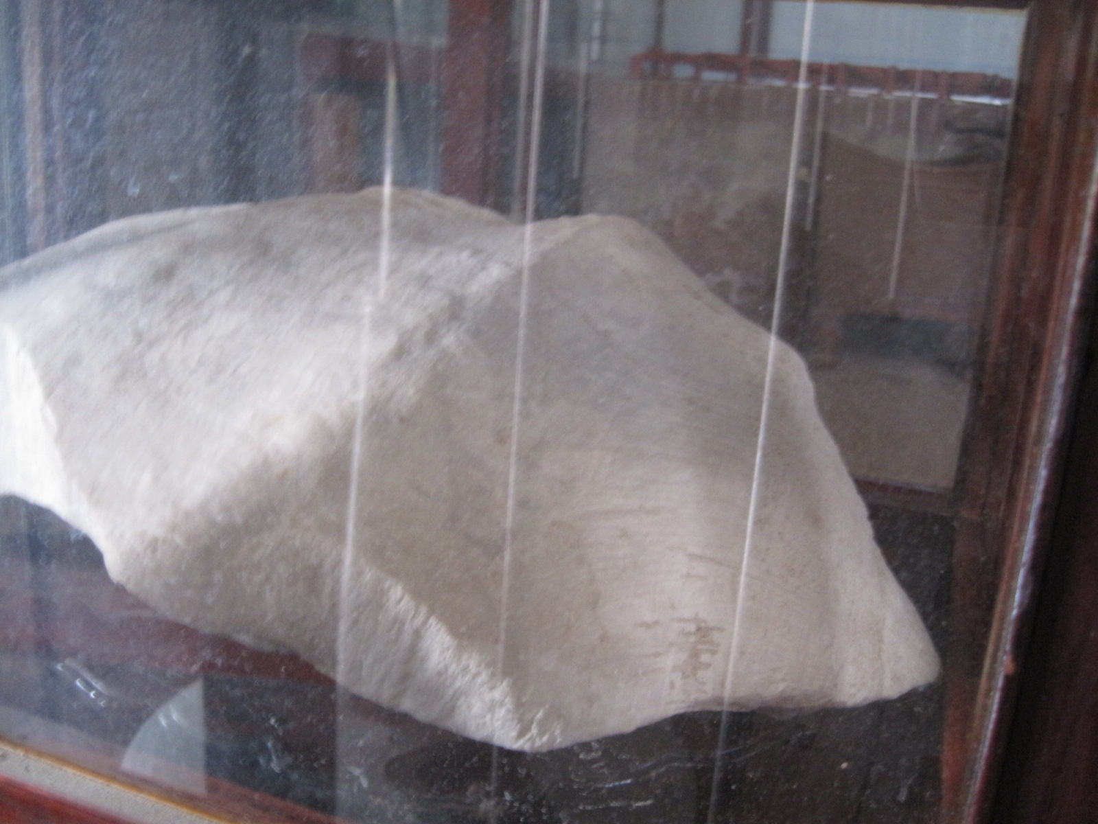 臺南開元寺所收藏的化石